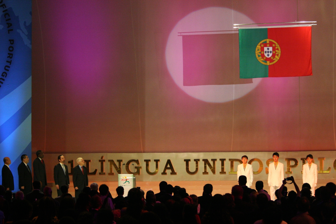 A cerimônia de encerramento dos Jogos da Lusofonia de Macau